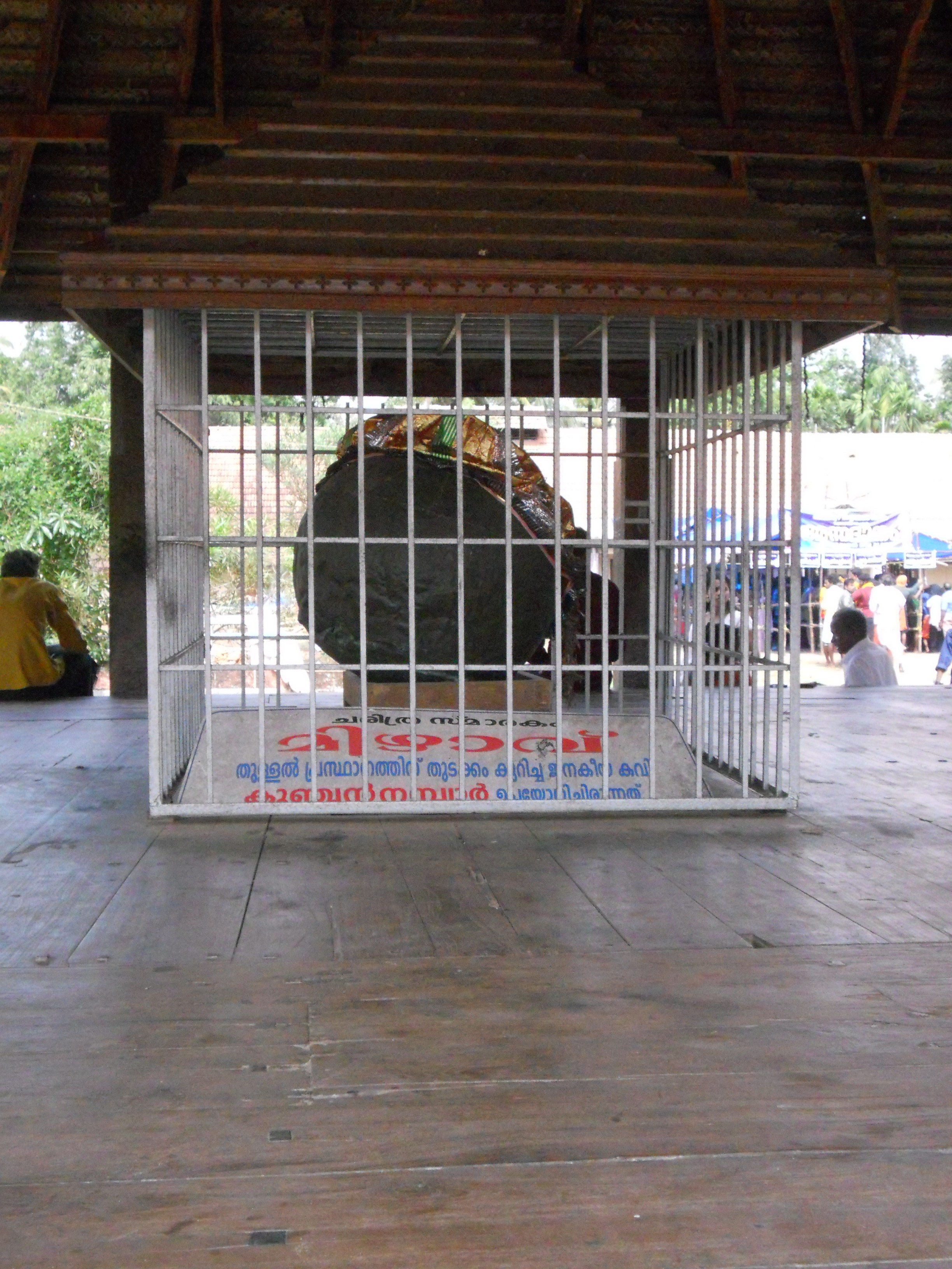 അമ്പലപ്പുഴ ക്ഷേത്രത്തില്‍ കുഞ്ചന്‍ നമ്പ്യാര്‍ ഉപയോഗിച്ച മിഴാവ് പ്രദര്‍ശിപ്പിച്ചിരിക്കുന്നു